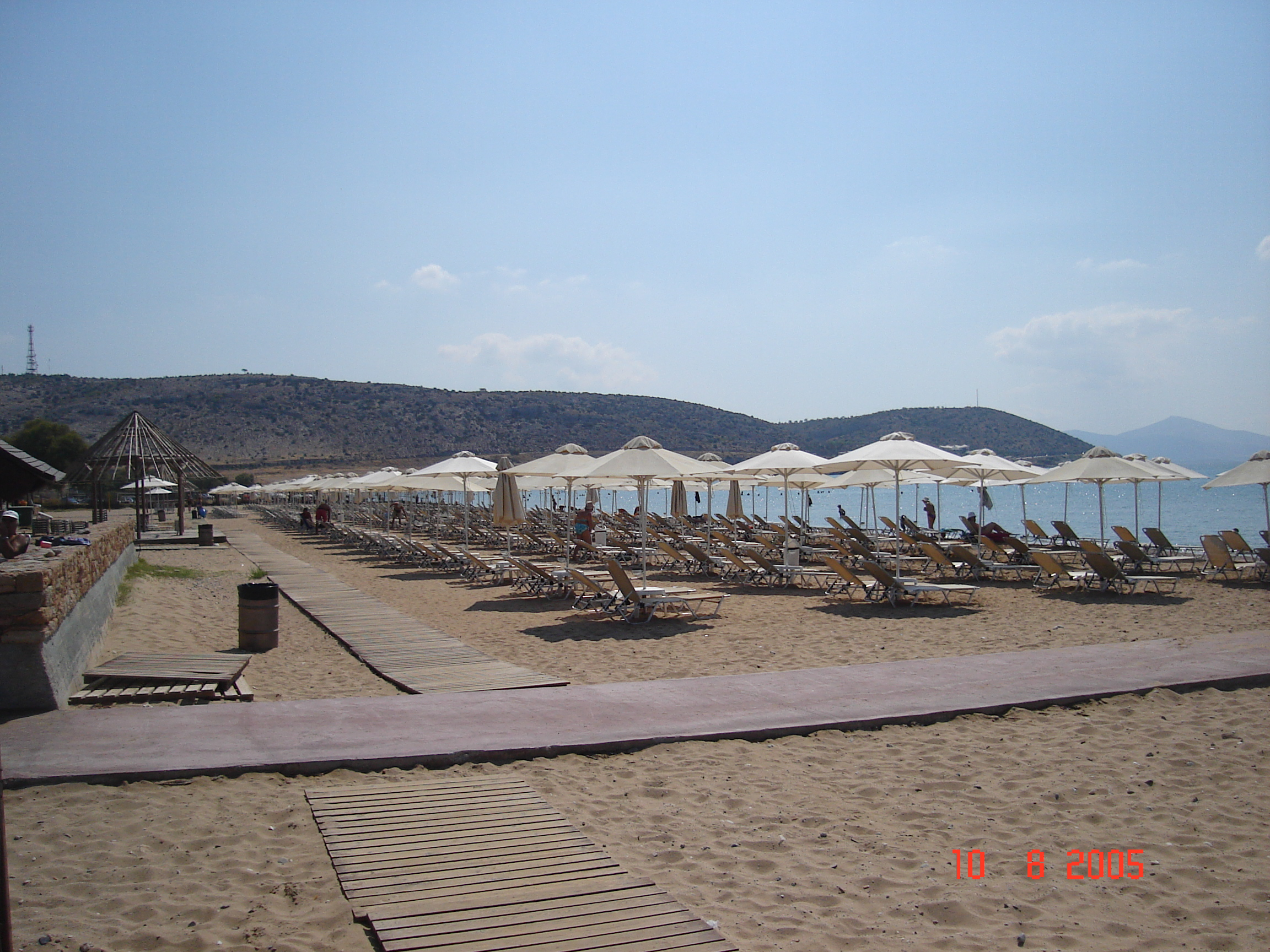 Varkiza Beach